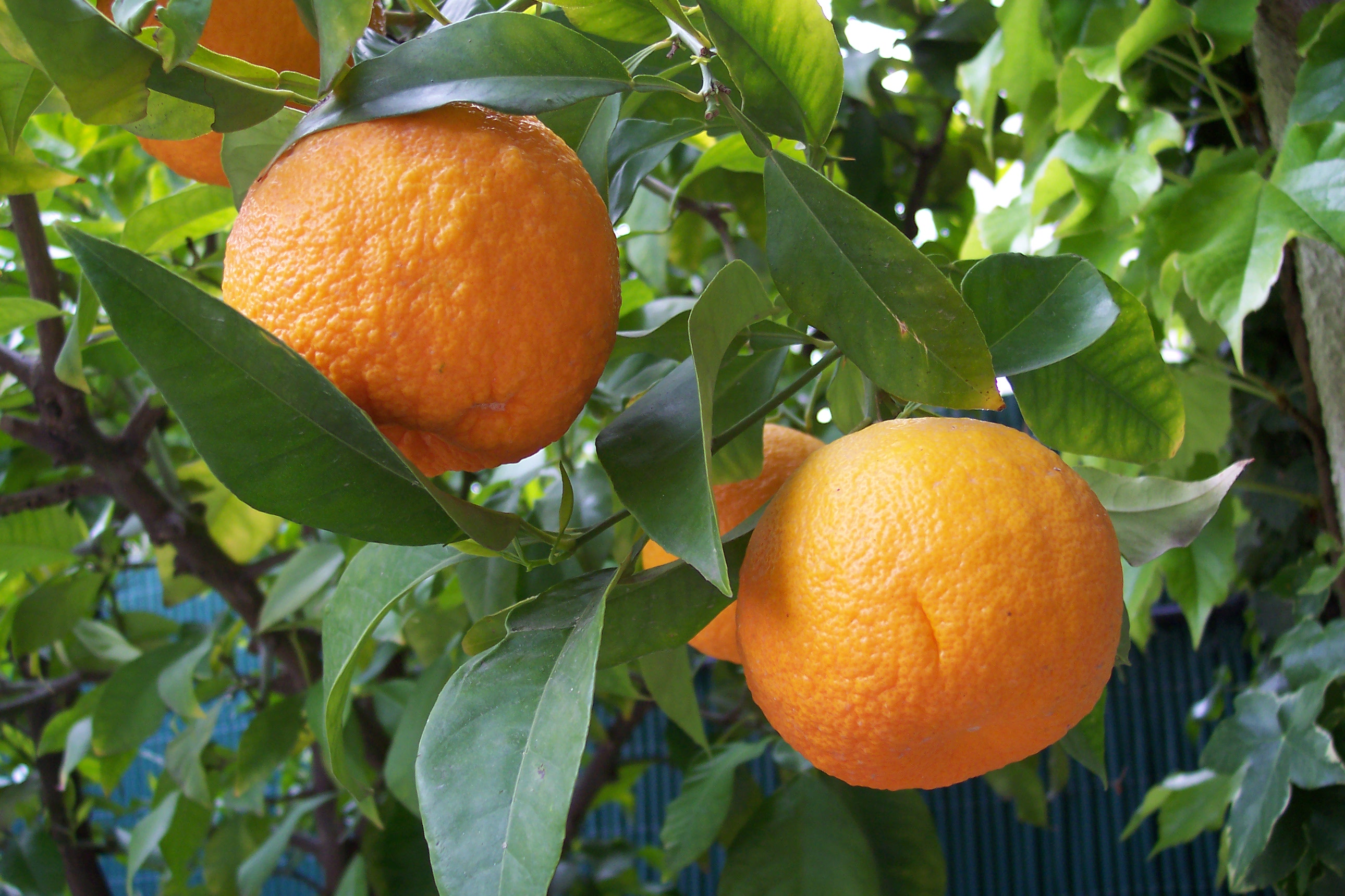 Citrus aurantium. Real Jardín Botánico de Madrid.